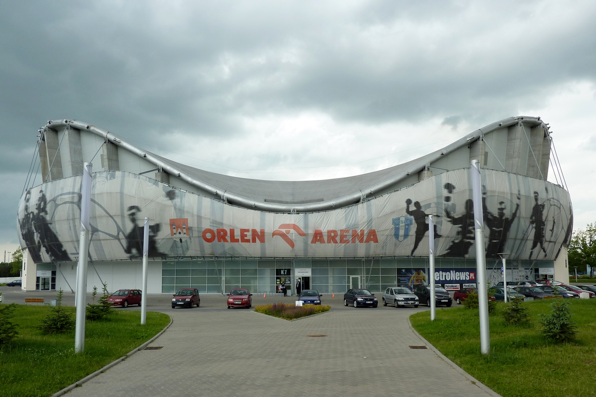 Orlen Arena – hala widowiskowo-sportowa znajdująca się Płocku.